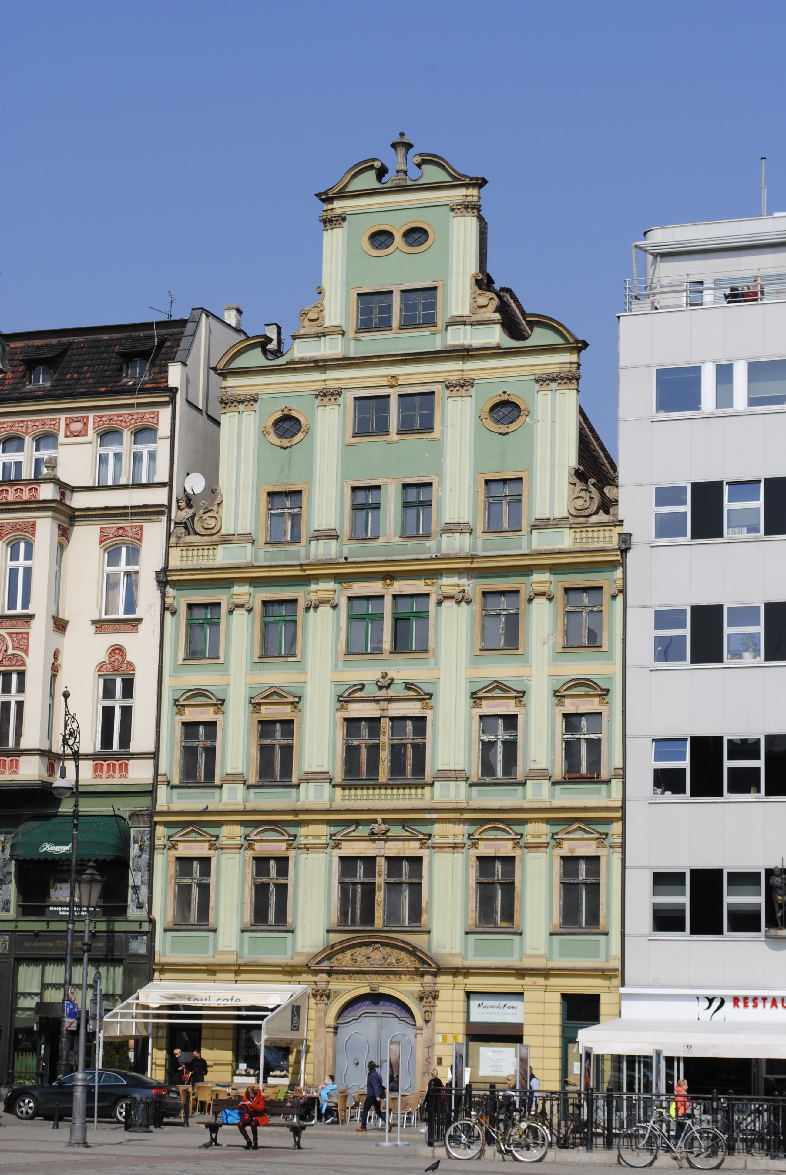 Haus Nr. 4 am Breslauer Salzmarkt